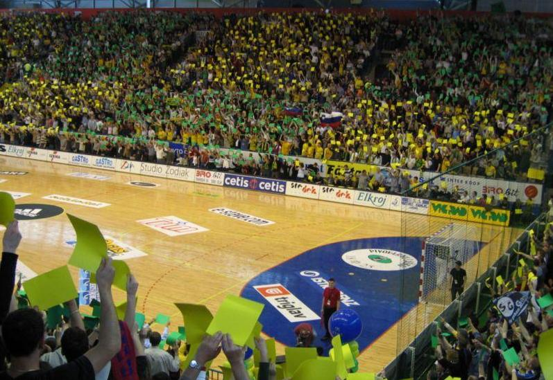 Hexenkessel Dvorana Zlatorog